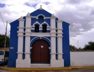 bueno